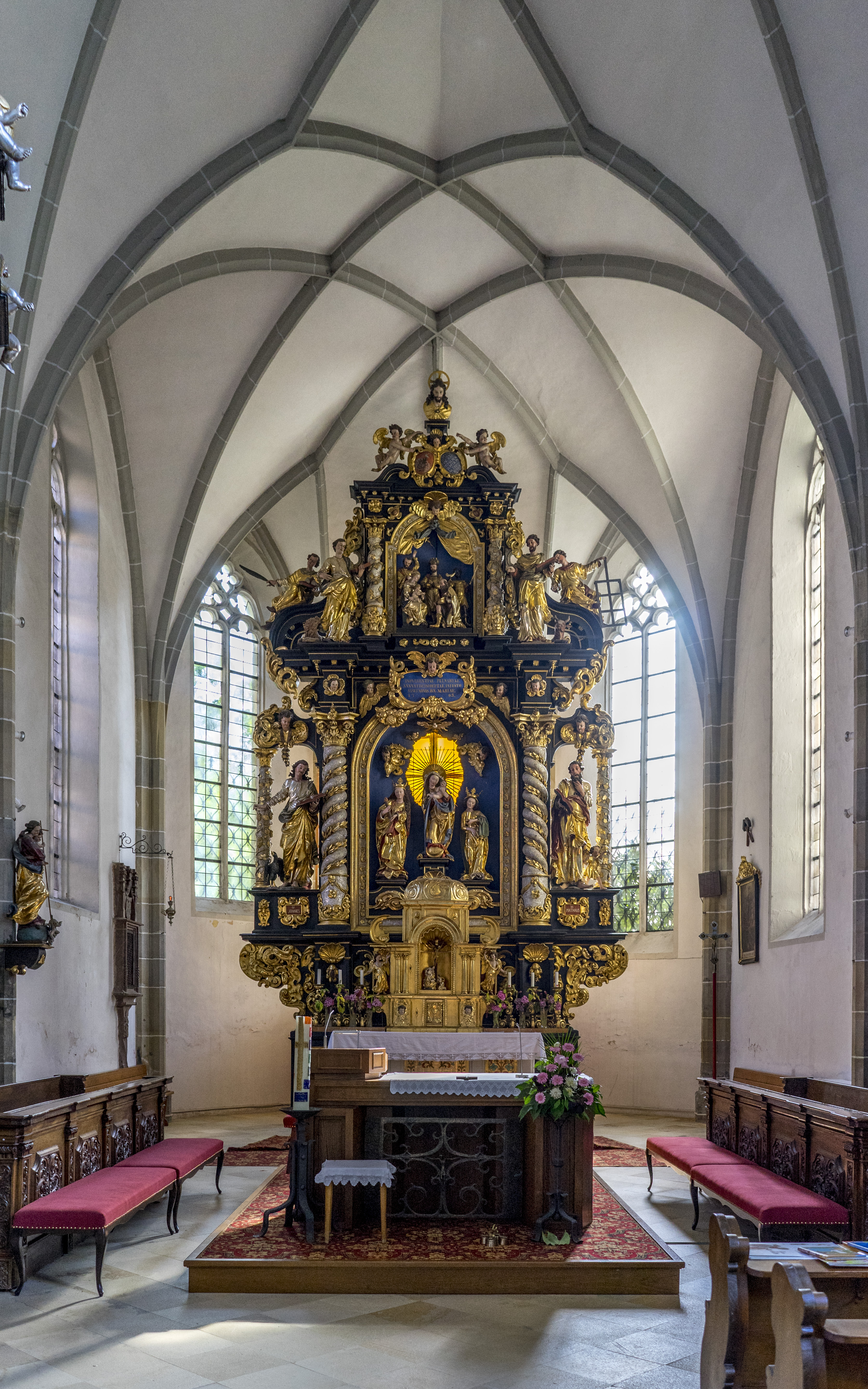 Pfarrkirche Zell am Pettenfirst Hauptaltar